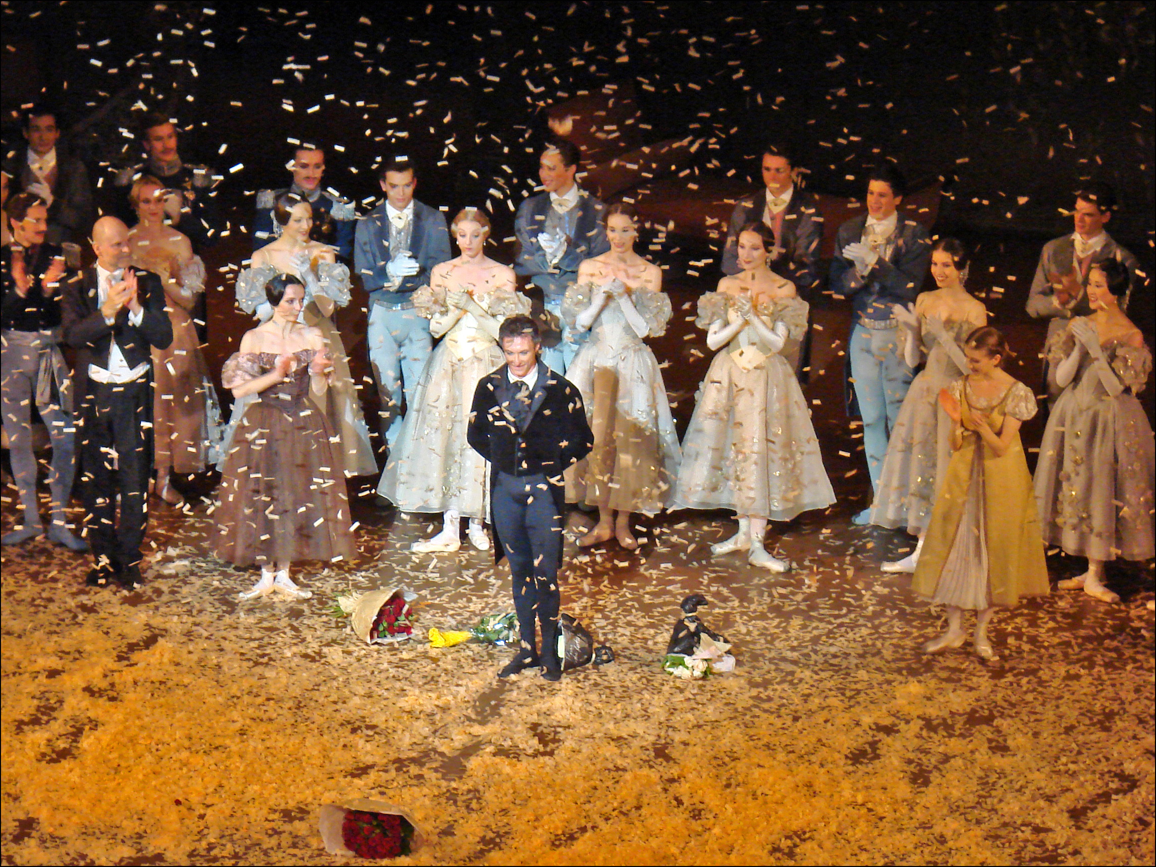 L'ovation faite à Manuel Legris (au centre), danseur étoile du ballet de l'Opéra pour sa dernière représentation dans Eugène Onéguine, le 15 mai 2009. Manuel Legris a été nommé le 11 juillet 1986, à la suite de son interprétation du rôle de Jean De Brienne dans le ballet Raymonda, chorégraphié par Rudolf Noureev, lorsque ce dernier était directeur de la Danse à l'Opéra de Paris. L'exposition Rudolf Noureev à Moulins A gauche sur la photo au 2ème plan : Clairemarie Osta (danseuse étoile dans le rôle de Tatiana), à droite sur la photo au 2ème plan : Myriam Ould-Braham (première danseuse dans le rôle d'Olga, soeur de Tatiana). Tout à gauche, le chef d'orchestre : James Tuggle. A l'arrière, les danseurs du corps de ballet.